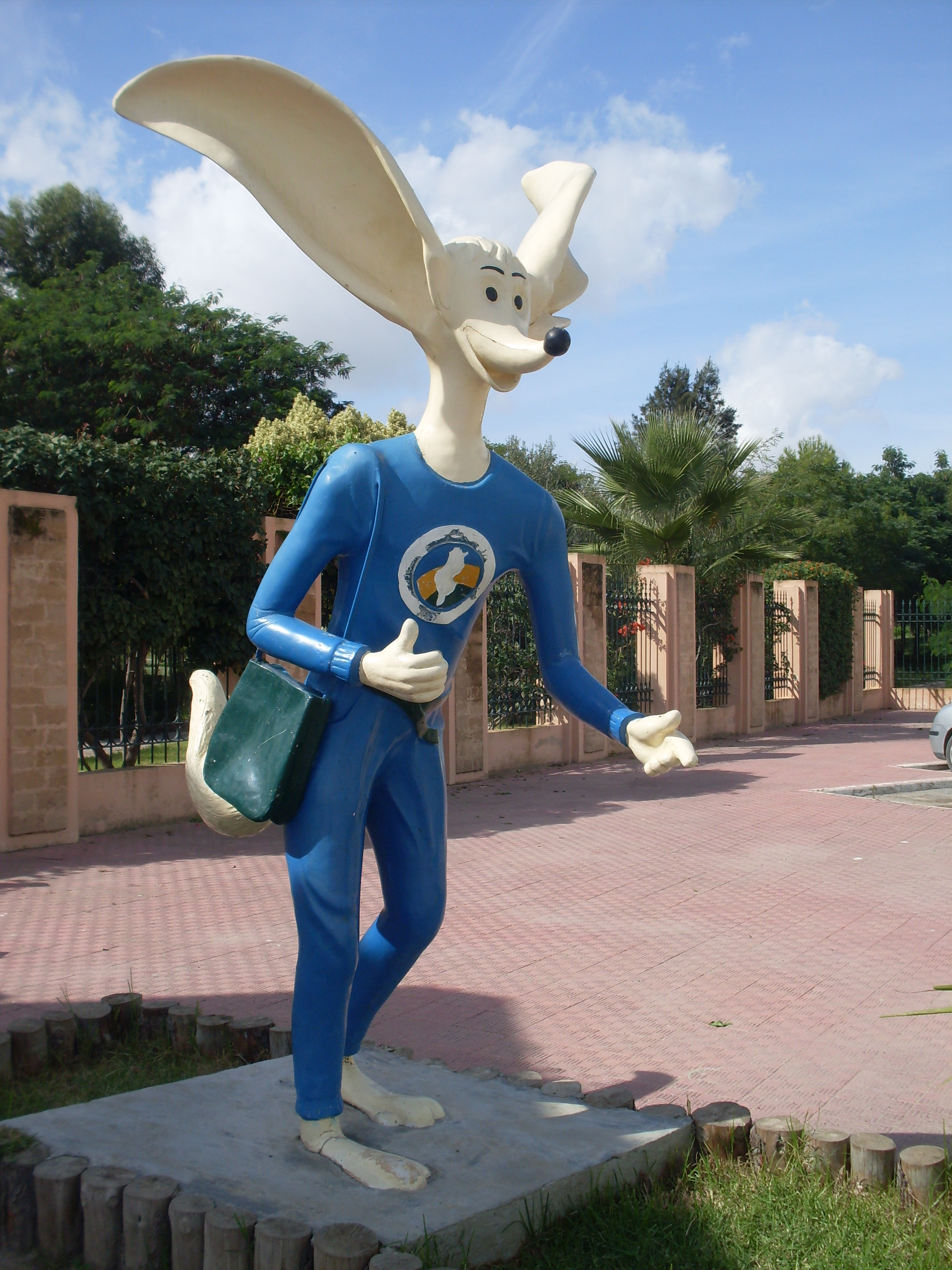 Tunisie, Cité d'el mourouj, Montazah, Labib la mascotte de l'environnement